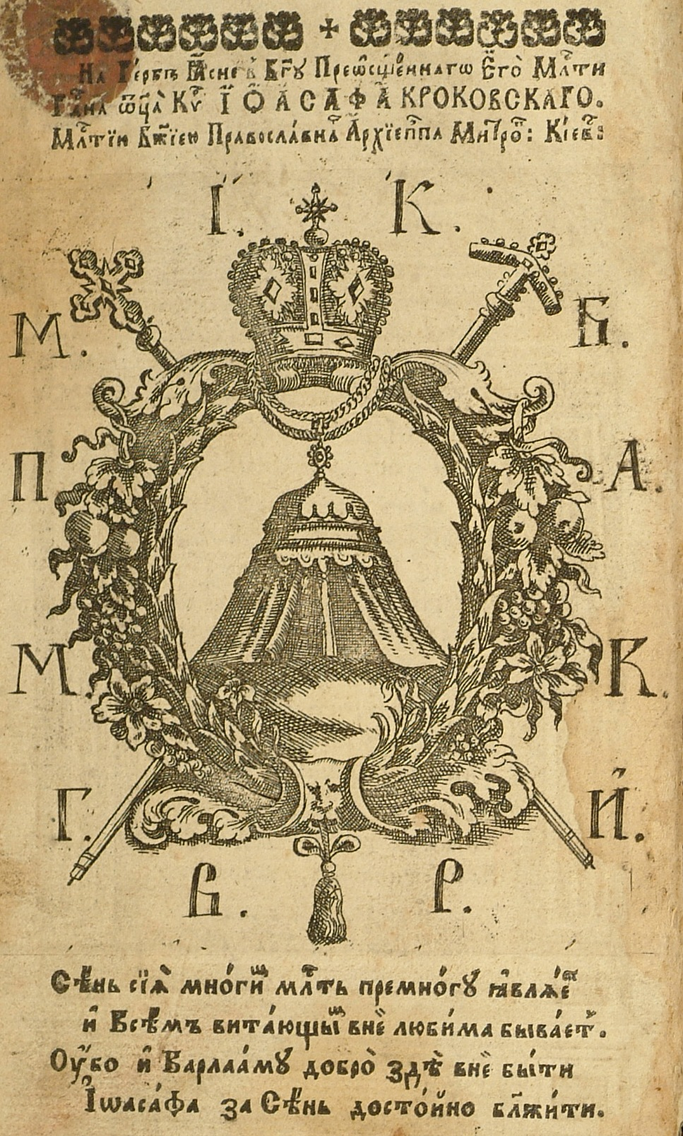 Диалогисм духовный (1714) – герб Иоасафа Кроковского.